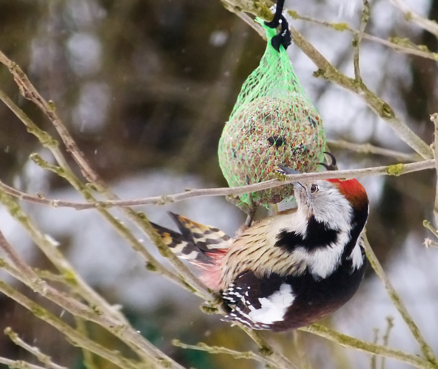 Mittelspecht am Meisenknödel, März 2013, Mecklenburg, Rieps, OT Cronskamp